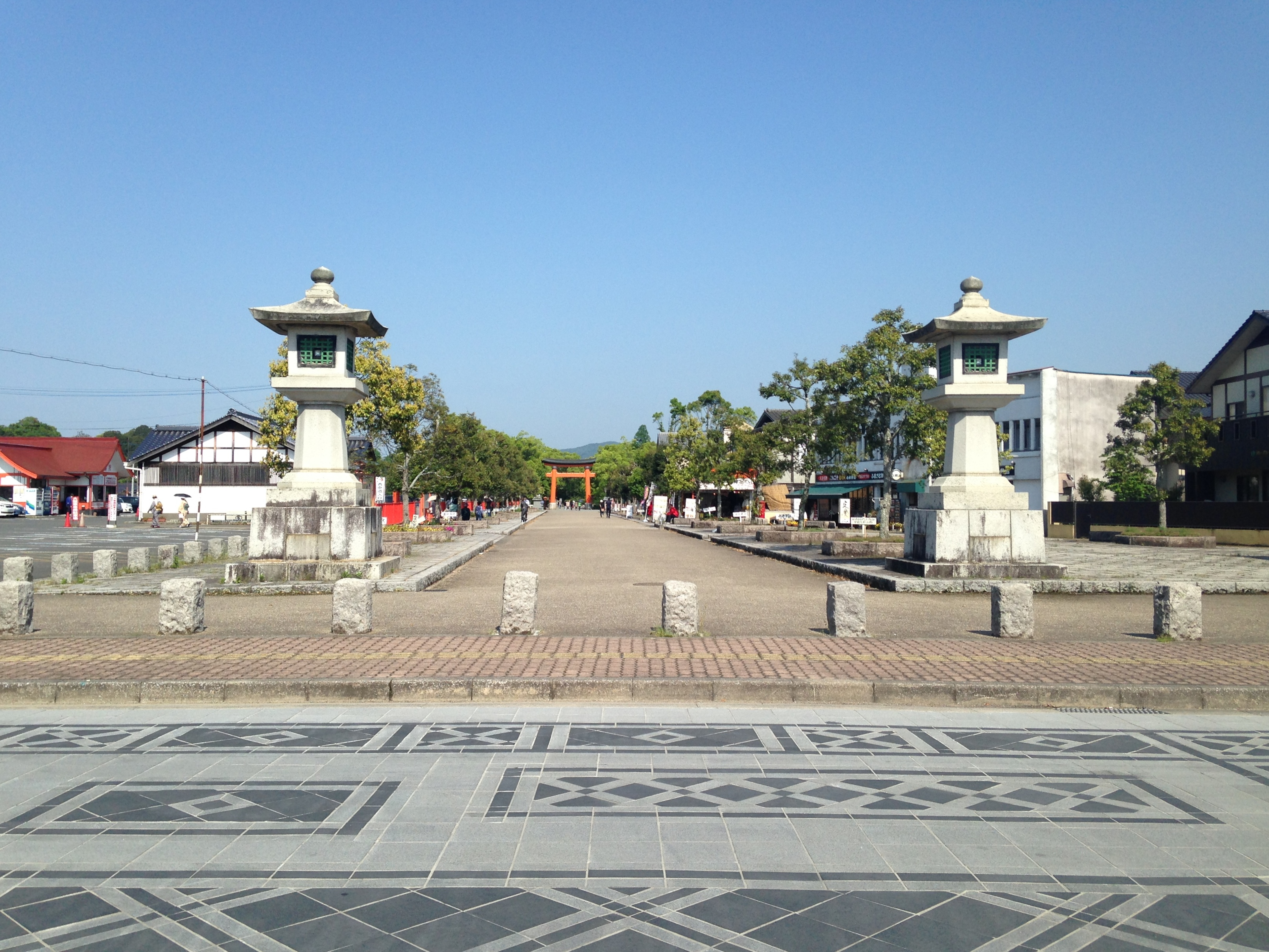 宇佐神宮の表参道